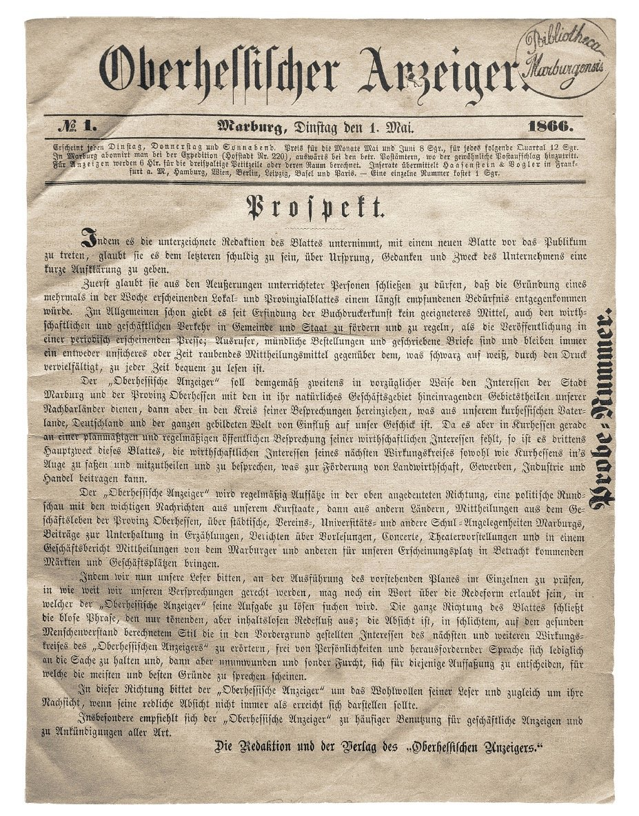 Erstausgabe des "Oberhessischen Anzeigers" vom 1. Mai 1866, der ersten Marburger Zeitung, die mehrmals in der Woche erschien und aus der der später die Oberhessische Presse hervorging.